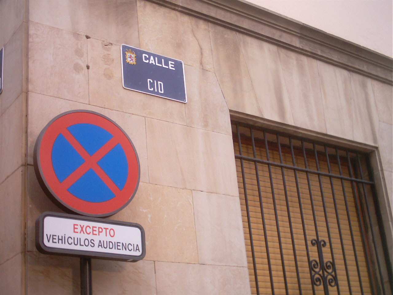 Rua Cid, em León, na Espanha. "Calle Cid", a street in León, Spain.